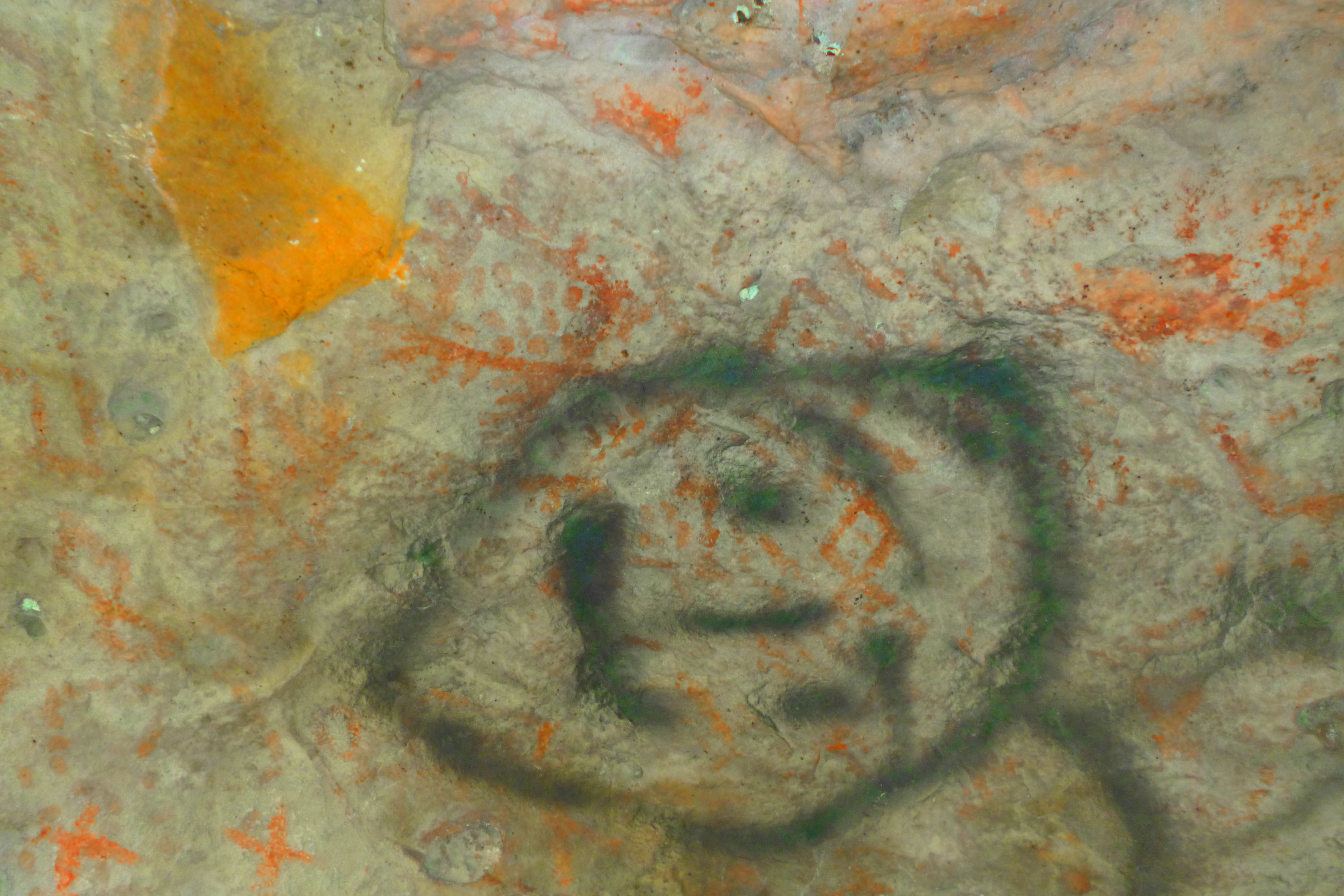 pictogramas dibujados por el pueblo muisca posiblemente entre IV al XVI apesar de estar cubierto por aerosol negro aun se pueden apreciar sus formas y símbolos